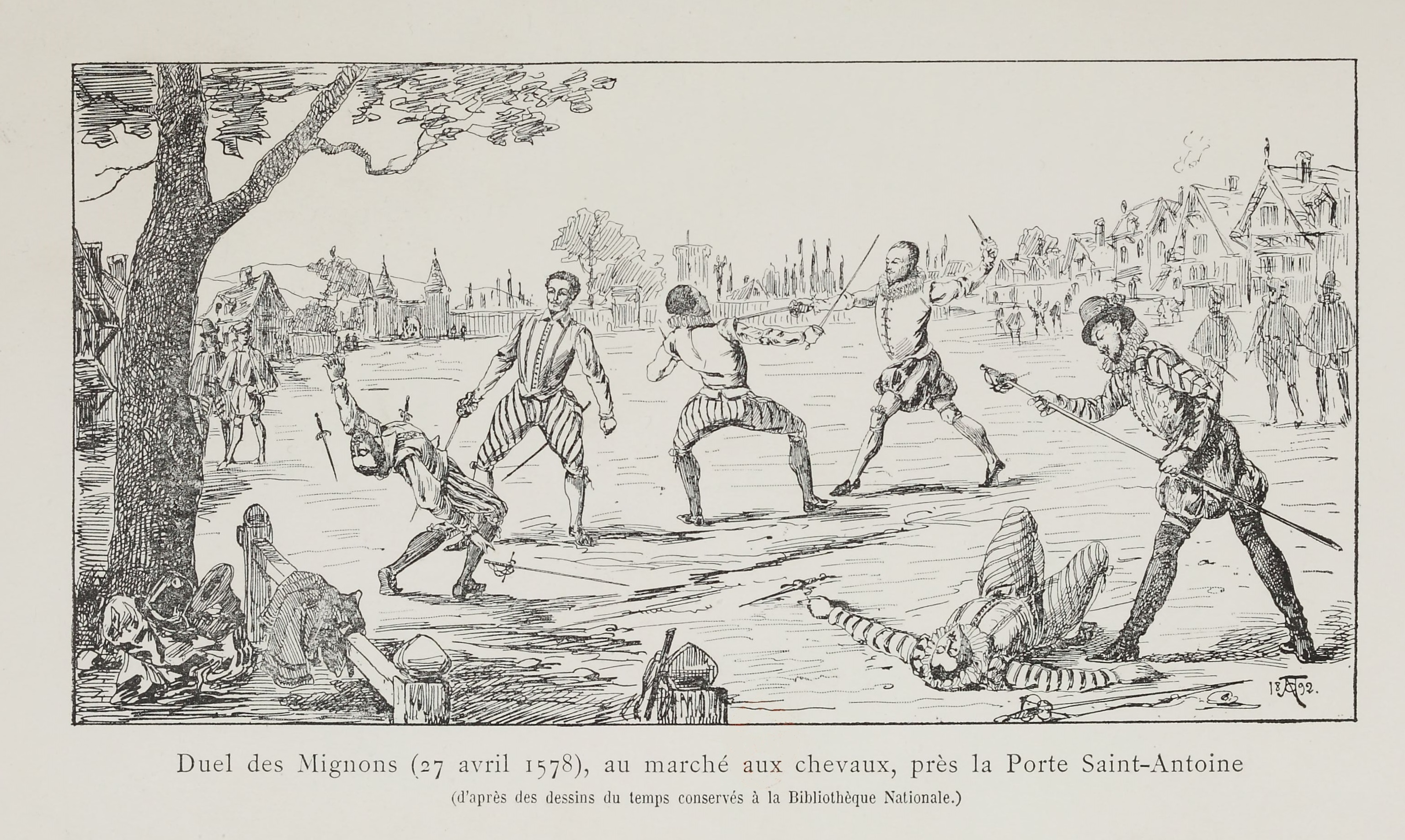 Le duel des mignons, gravure publiée dans l'ouvrage de Gabriel Letainturier (1864-1948), Le Duel à travers les âges, histoire et législation, duels célèbres, code du duel, Paris, Librairie Marpon & Flammarion, 1892.